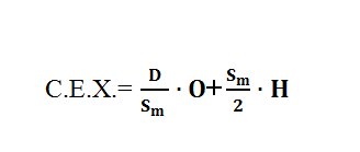 Cəmi Ehtiyat Xərclərinin hesablanması